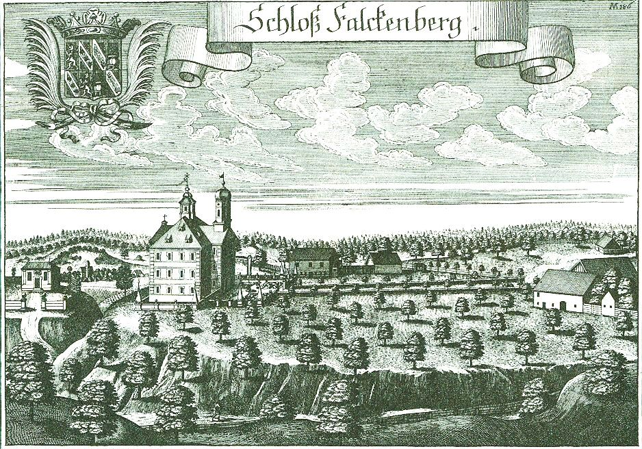 Schloss Falkenberg (Gemeinde Moosach) nach einem Stich von Michael Wening vom 1721